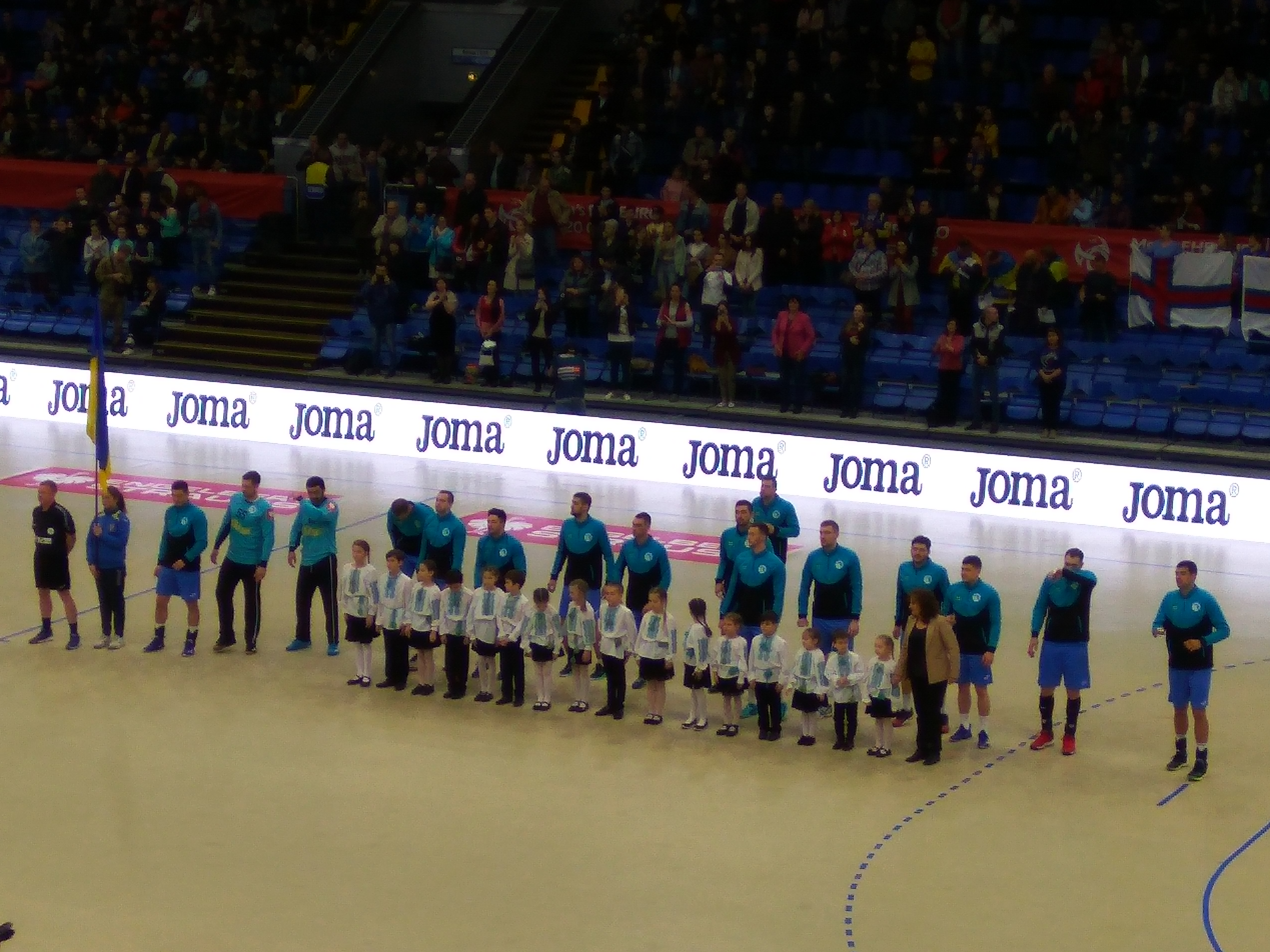 10.04.2019. Гандбол. Кваліфікація на Чемпіонат Європи 2020. Україна - Фарерські Острови 30-19